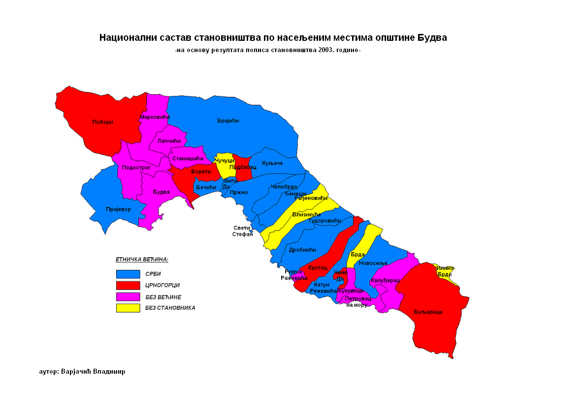 Етничка карта Будве